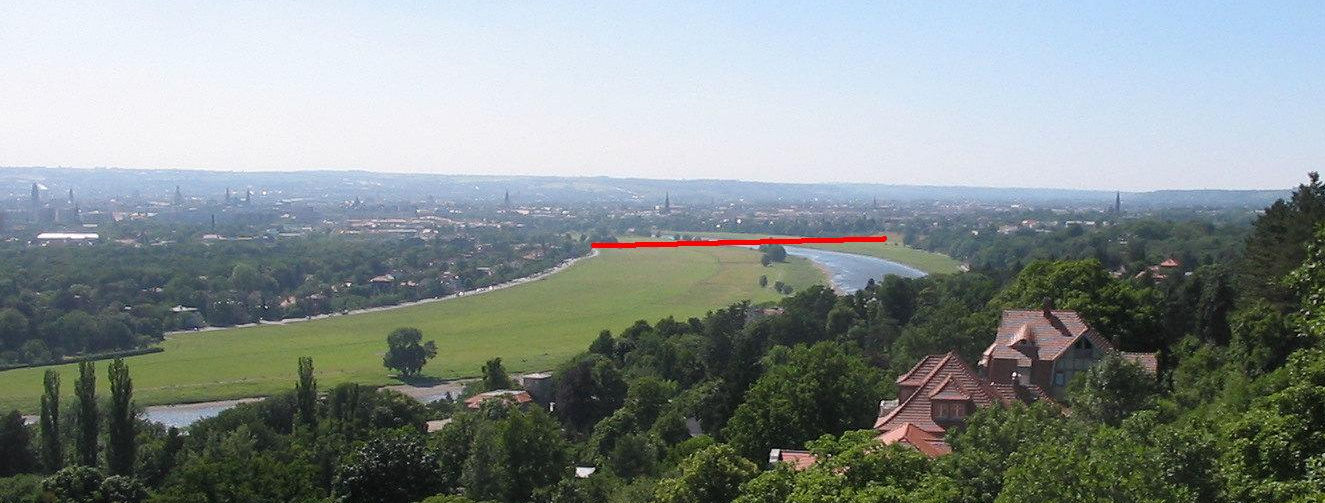 Das Elbtal in Dresden, mit eingezeichnetem geplanten Standort der Waldschlösschenbrücke. Fotografiert von der Terrasse des "Luisenhof" in Dresden Weißer Hirsch